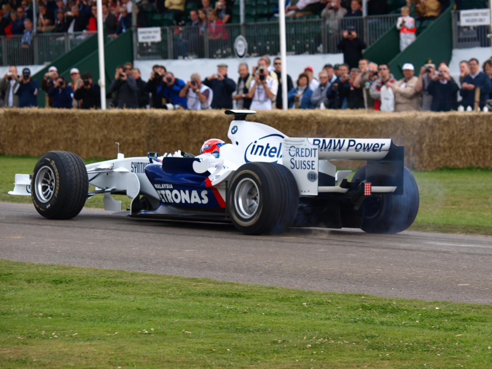 Marko Asmer Goodwood 2008